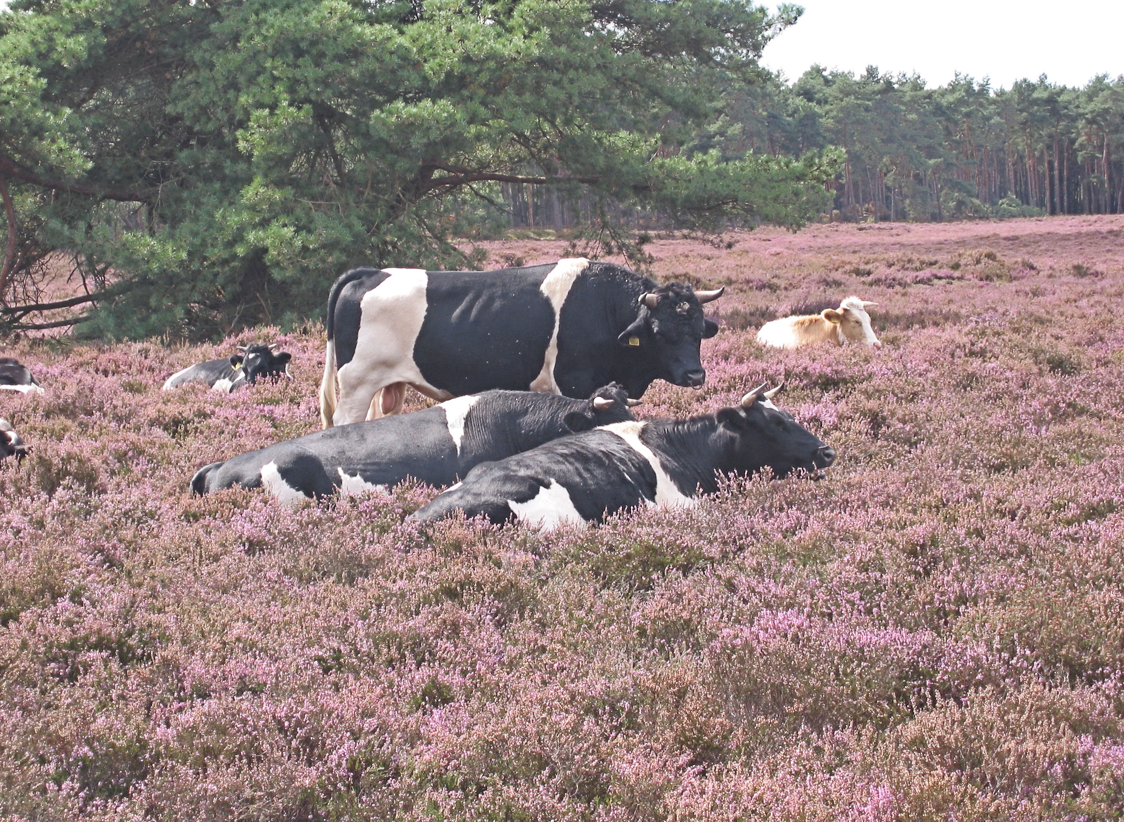 Wekeromse Zand heidekoeien met grote stier